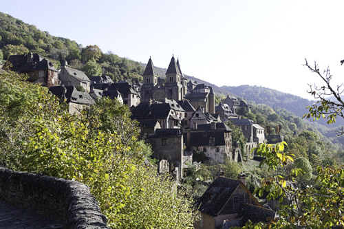 Vue générale de Conques